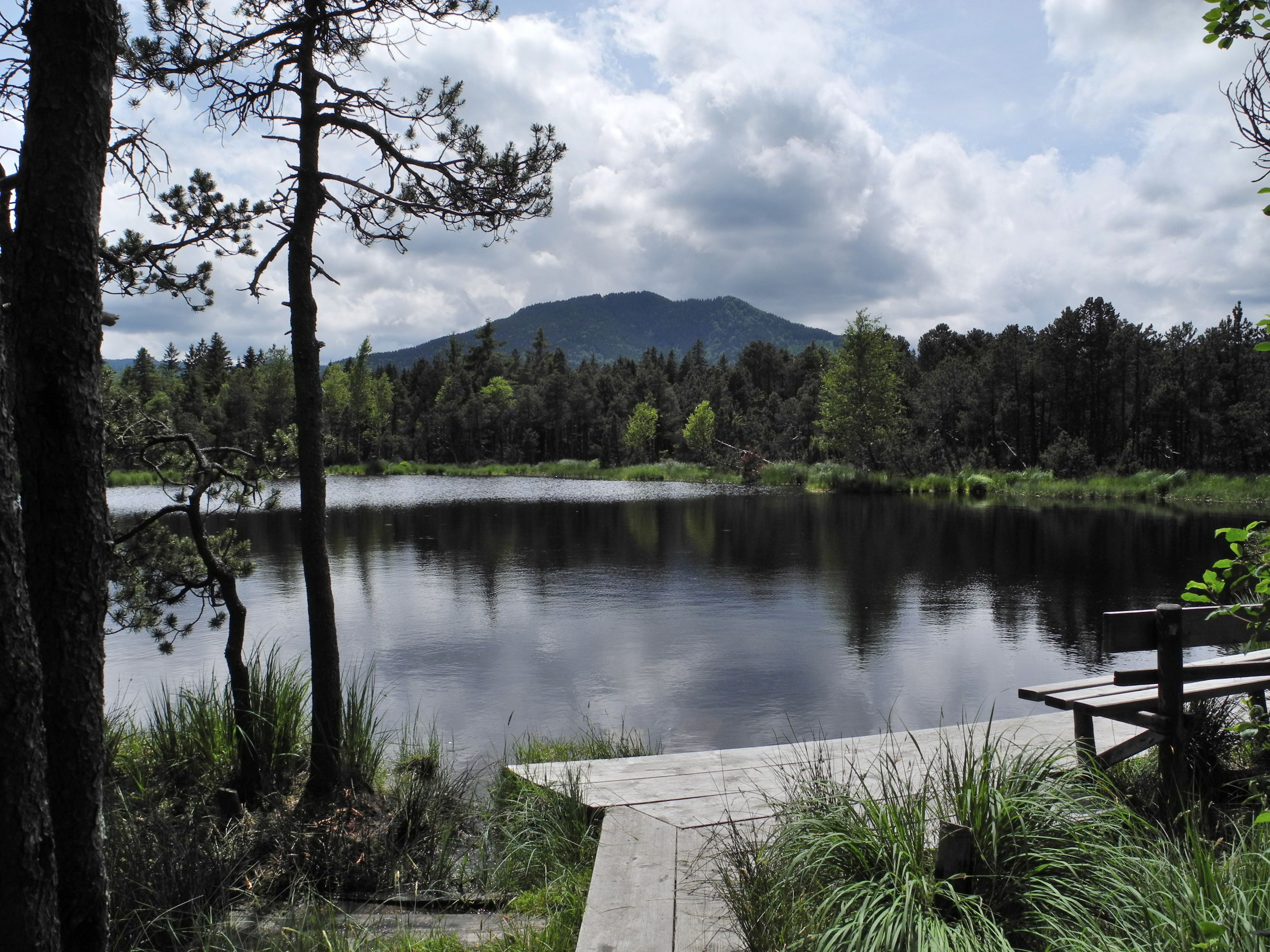 Der Tiefsee (Saulgrub), ein Moorsee im Altenauer Moor bei Saulgrub, Landkreis Garmisch-Partenkirchen.